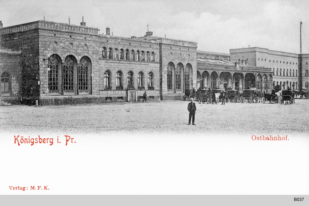 Königsberg